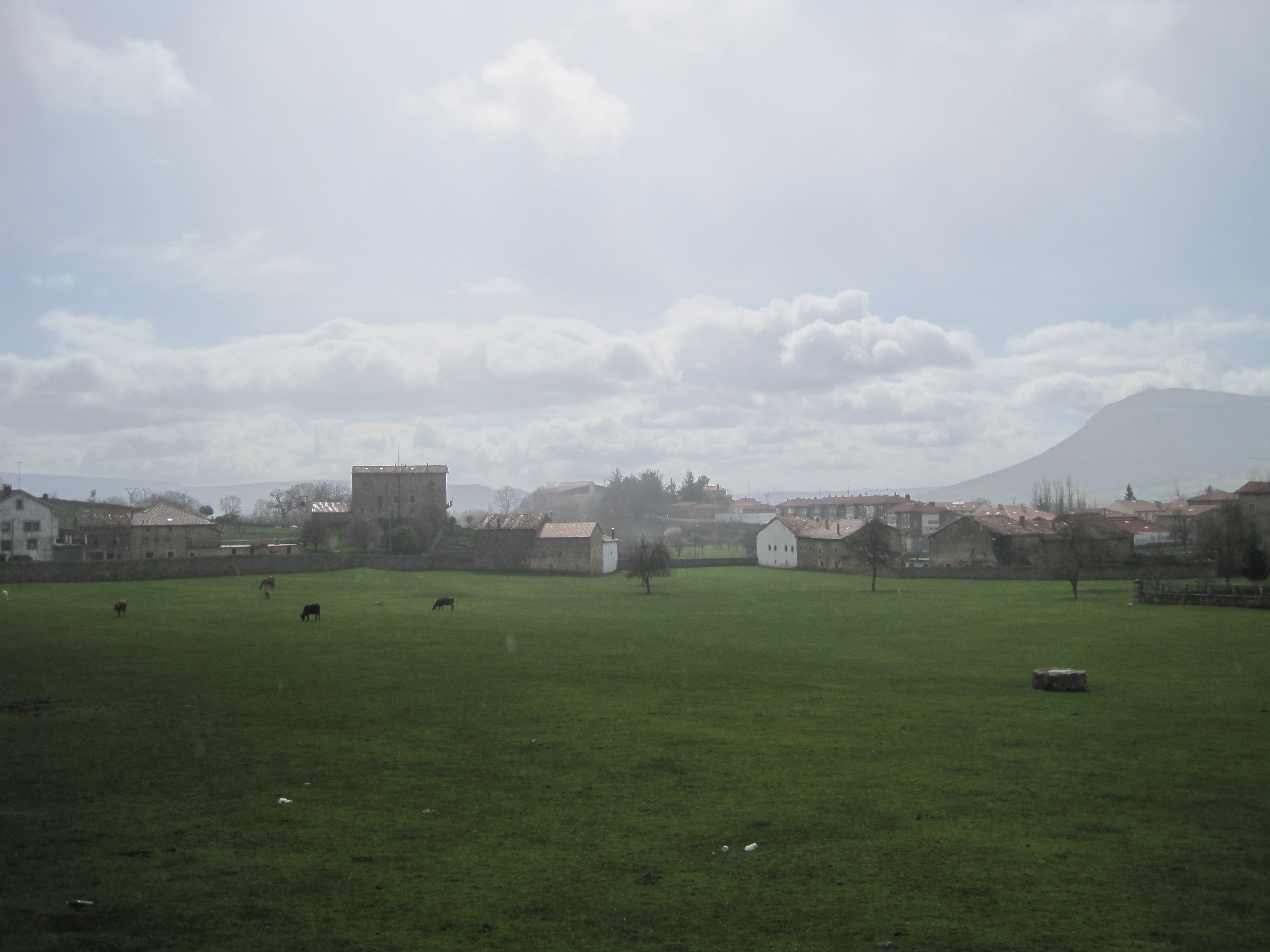 Espinosa posee pastos y prados excelentes para el ganado.